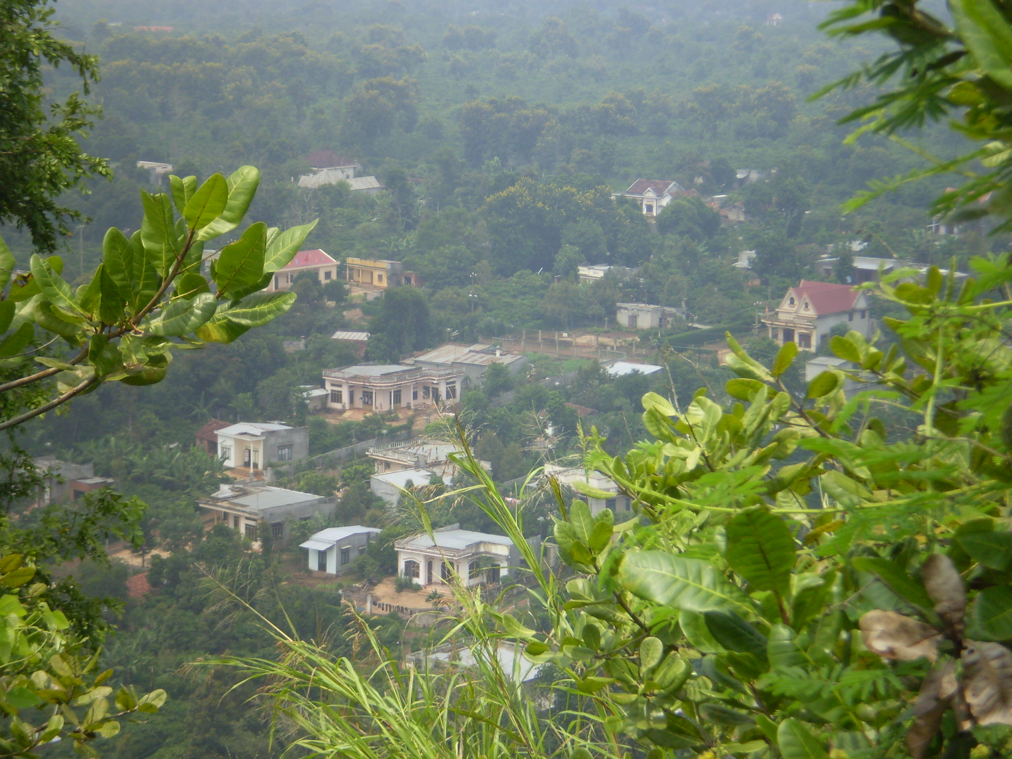 Một ngôi làng đi kinh tế mới từ năm 1979